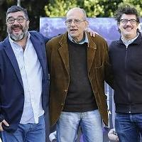 Venezia